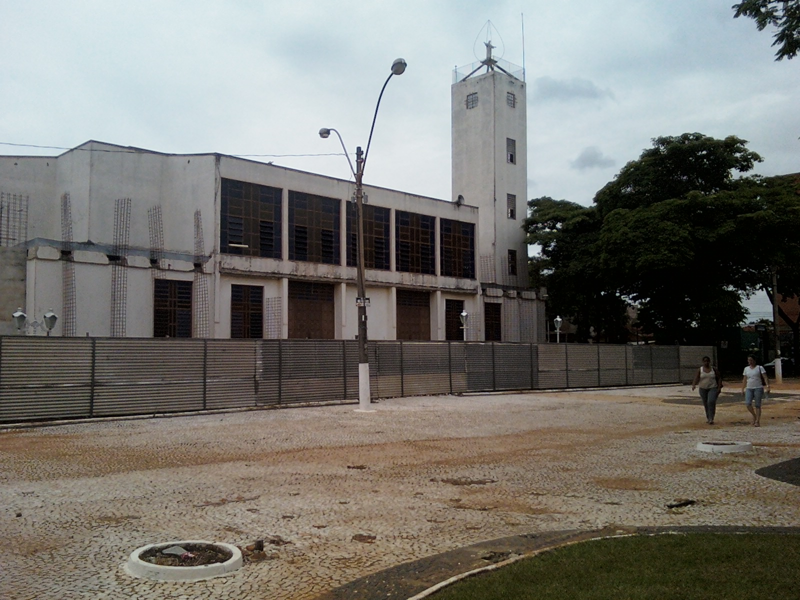 Igreja Matriz Católica de Paulínia, Sagrado Coração de Jesus, em reformas.